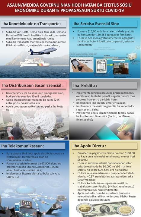 Wirtschaftsmaßnahmen in Osttimor wegen COVID-19